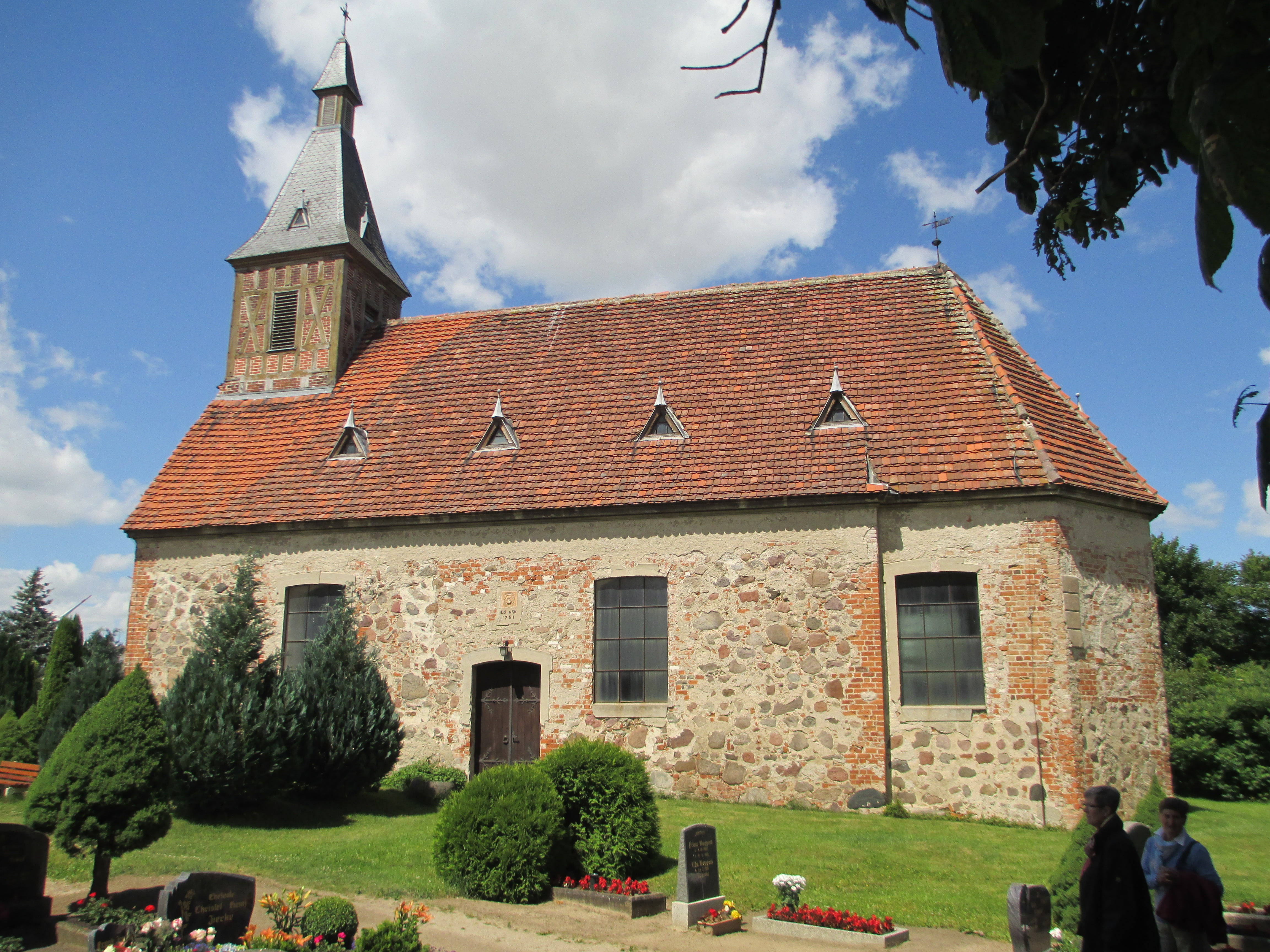 Kirche und Kirchhof in Werder (bei Altentreptow)